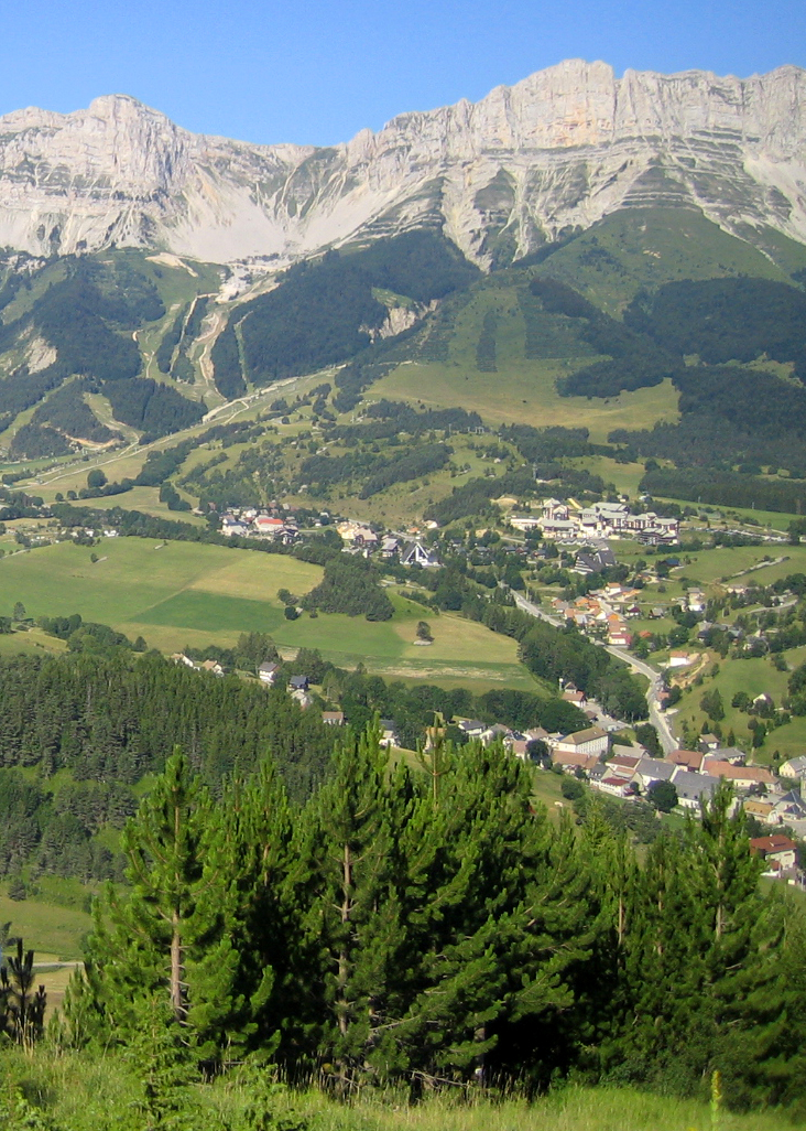 Gresse-en-Vercors (Isère, France) - Pendant la montée au Pas du Serpaton, vue sur la vallée de la Gresse. De la localité de Gresse n'est invisible, ici, qu'une partie du "village", avec l'église et le cimetière. La ligne verte des arbres qui coupe presque la photo en diagonale correspond au lit de la rivière, qui longe la route. Au centre, on remarque assez facilement le pignon triangulaire d'une colonie de vacances. Au-delà, à gauche s'étend la "Station" avec les remontées mécaniques. A droite, sont assez bien visibles les bâtiments de la résidence "Les Dolomites".